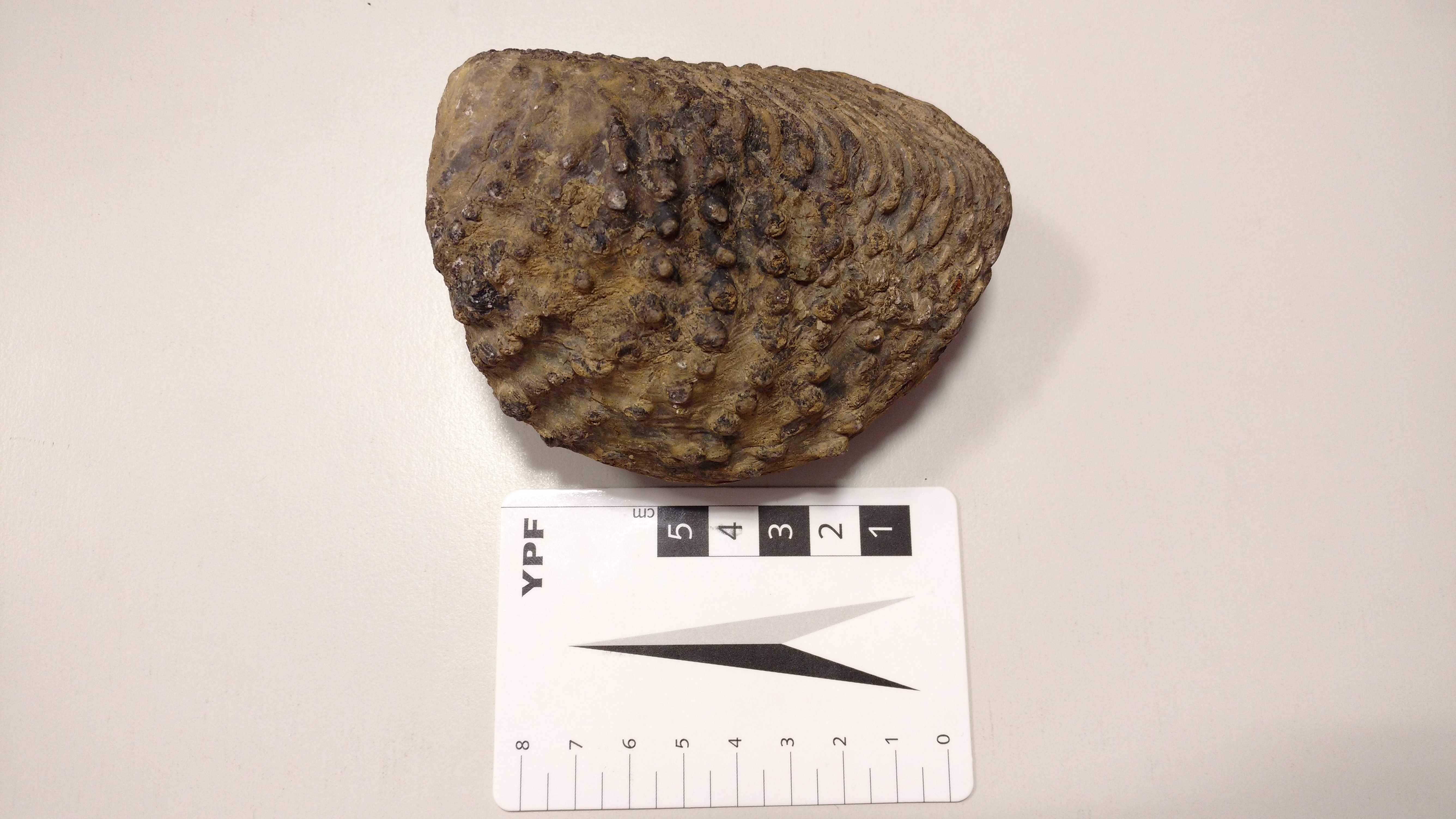 Ejemplar de la especie de molusco bivalvo Dietrich, 1933 Steinmanella Transitoriavisto. Formación Agrio, Cuenca Neuquina. Provincia del Neuquén, Argentina.